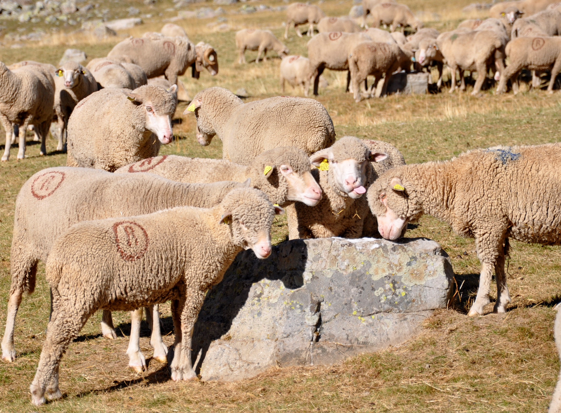 Moutons se nourrissant de sel